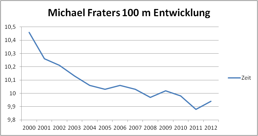 Enticklung der Saisonbestleistung von Michael Frater über 100 Meter